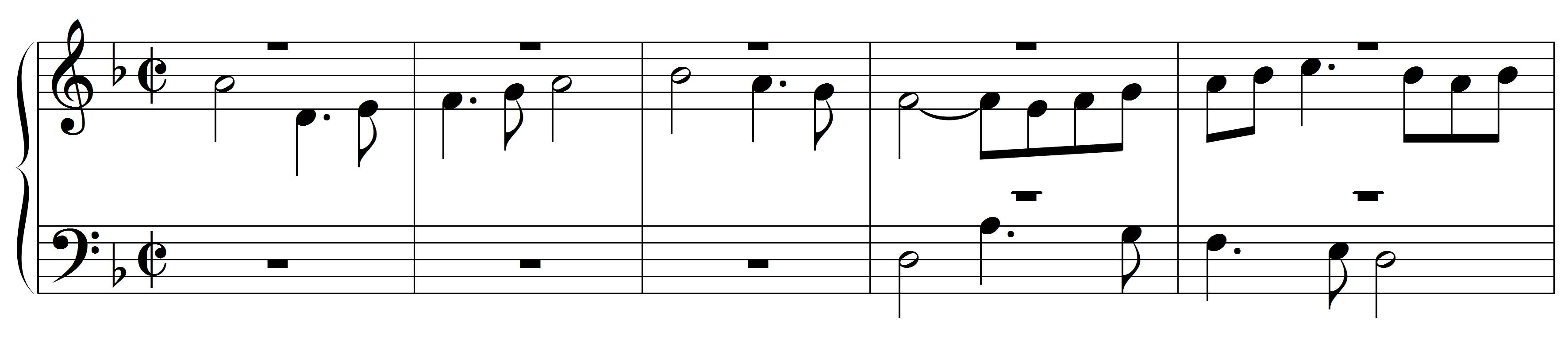 Bach, JS, Incipit Contrapunctus 5, BWV 1080